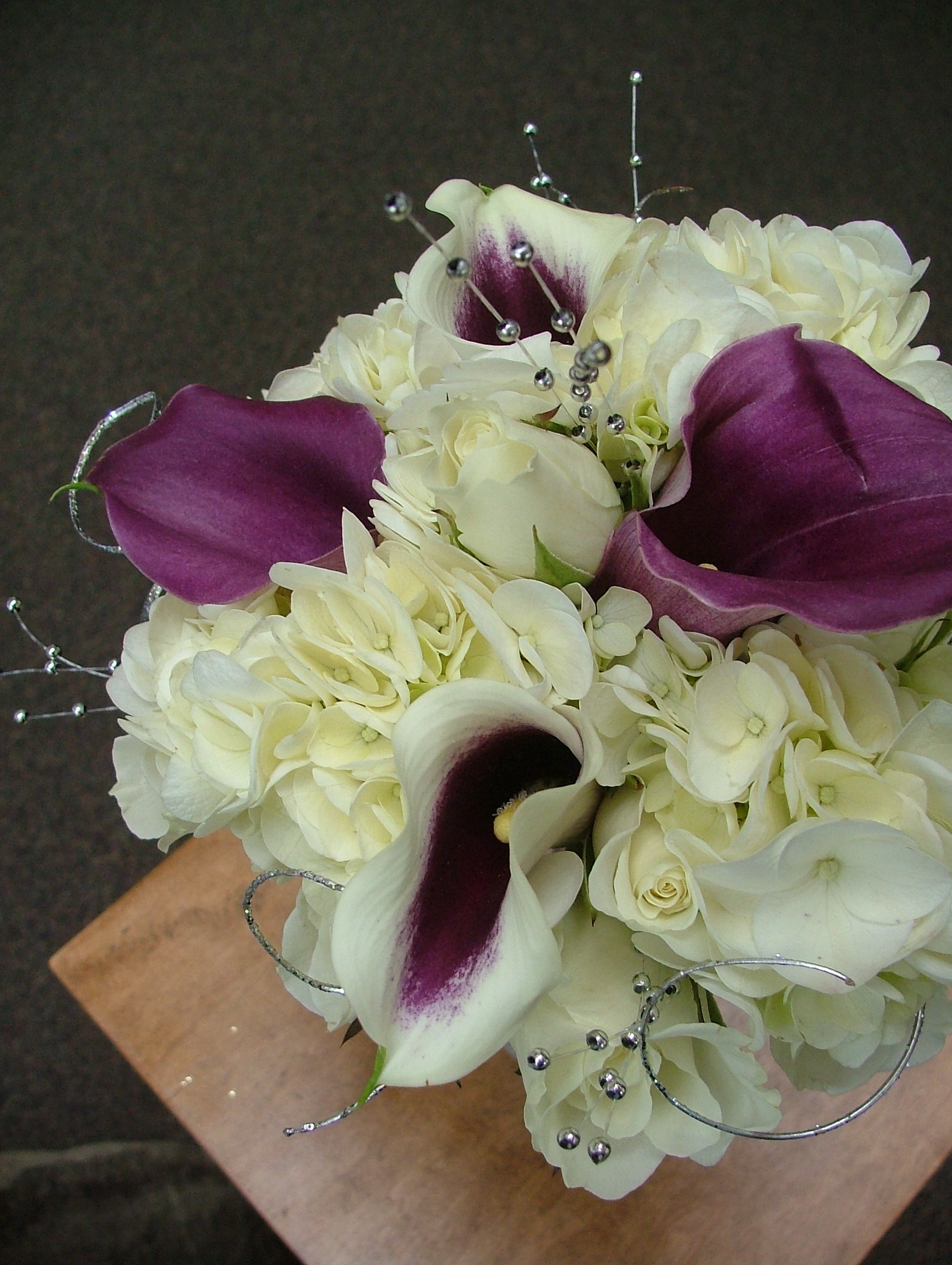 Bridal bouquet